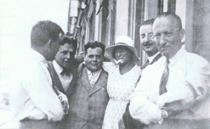 Redakcja Robotnika w latach trzydziestych